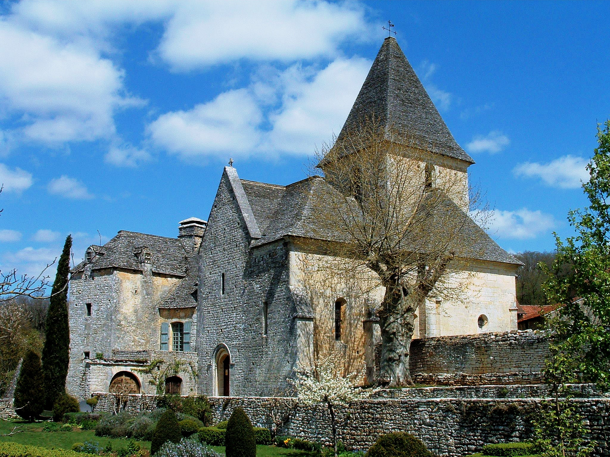 La Cassagne - Prieuré